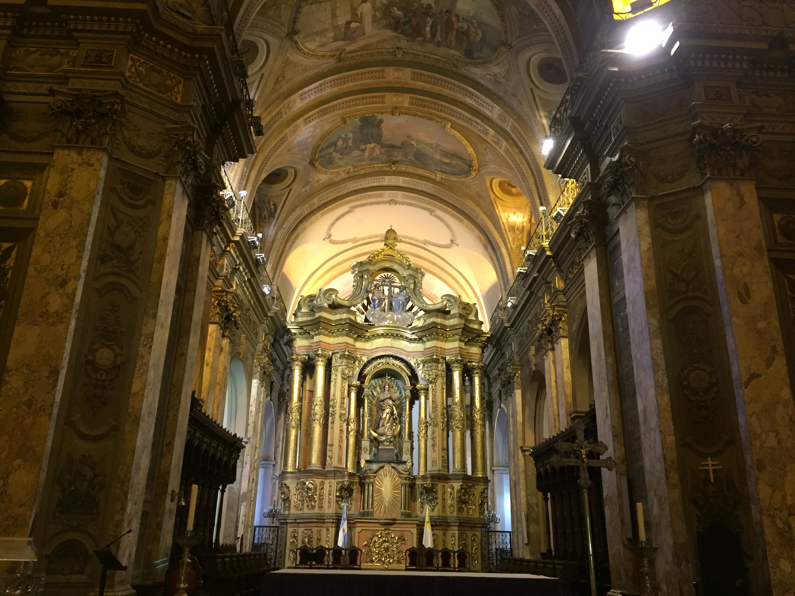 Buenos Aires Şehir Katedrali ana mihrabı 2018